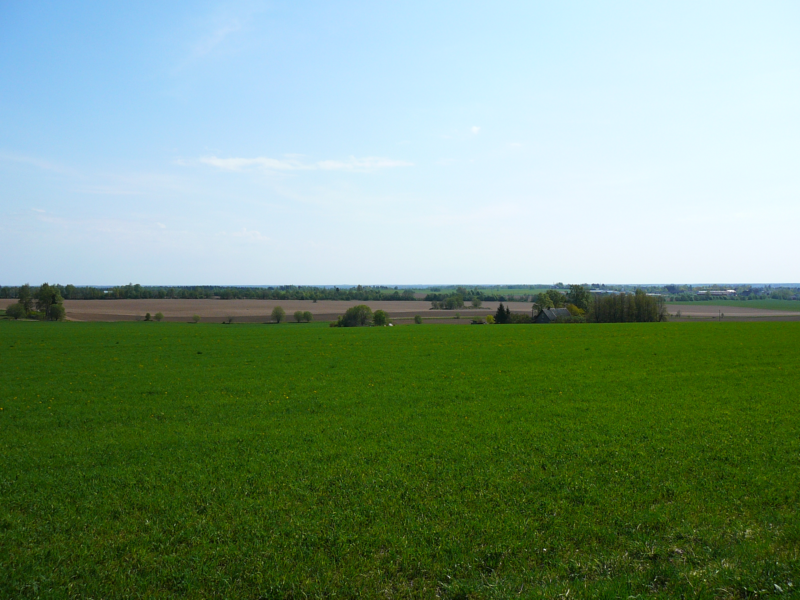 Pandivere kõrgustiku kõrguselt teine kõrgendik